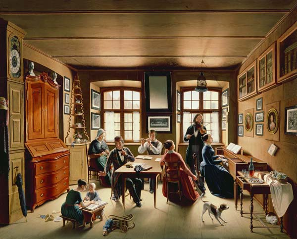 Sebastian Gutzwiller: Basler Familienkonzert, 1849. Öffentliche Kunstsammlung Basel, Kunstmuseum.